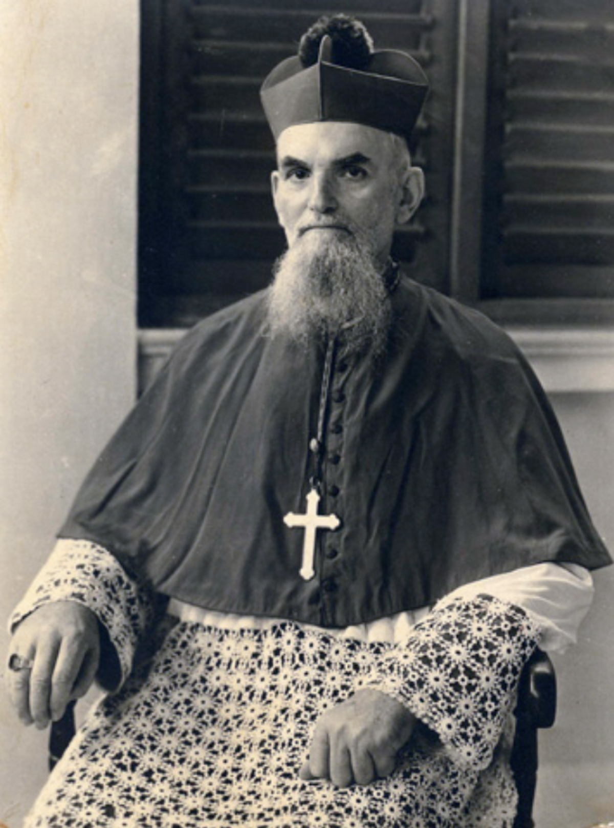 Mgr Joseph Strebler (né le 12 septembre 1892, à Mertzwiller, alors dans l'Empire allemand, et mort le 12 mars 1984 à Saint-Pierre) est un missionnaire catholique français alsacien qui fut préfet apostolique, puis archevêque de Lomé au Togo de 1955 à 1961.